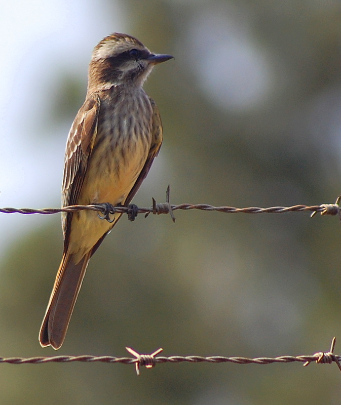 Empidonomus varius, Território dos Calçados" em Jau-SP